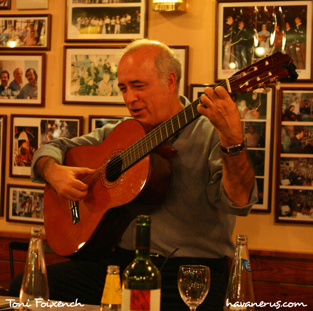 Càstor Pérez Diz, estudiós de l'havanera